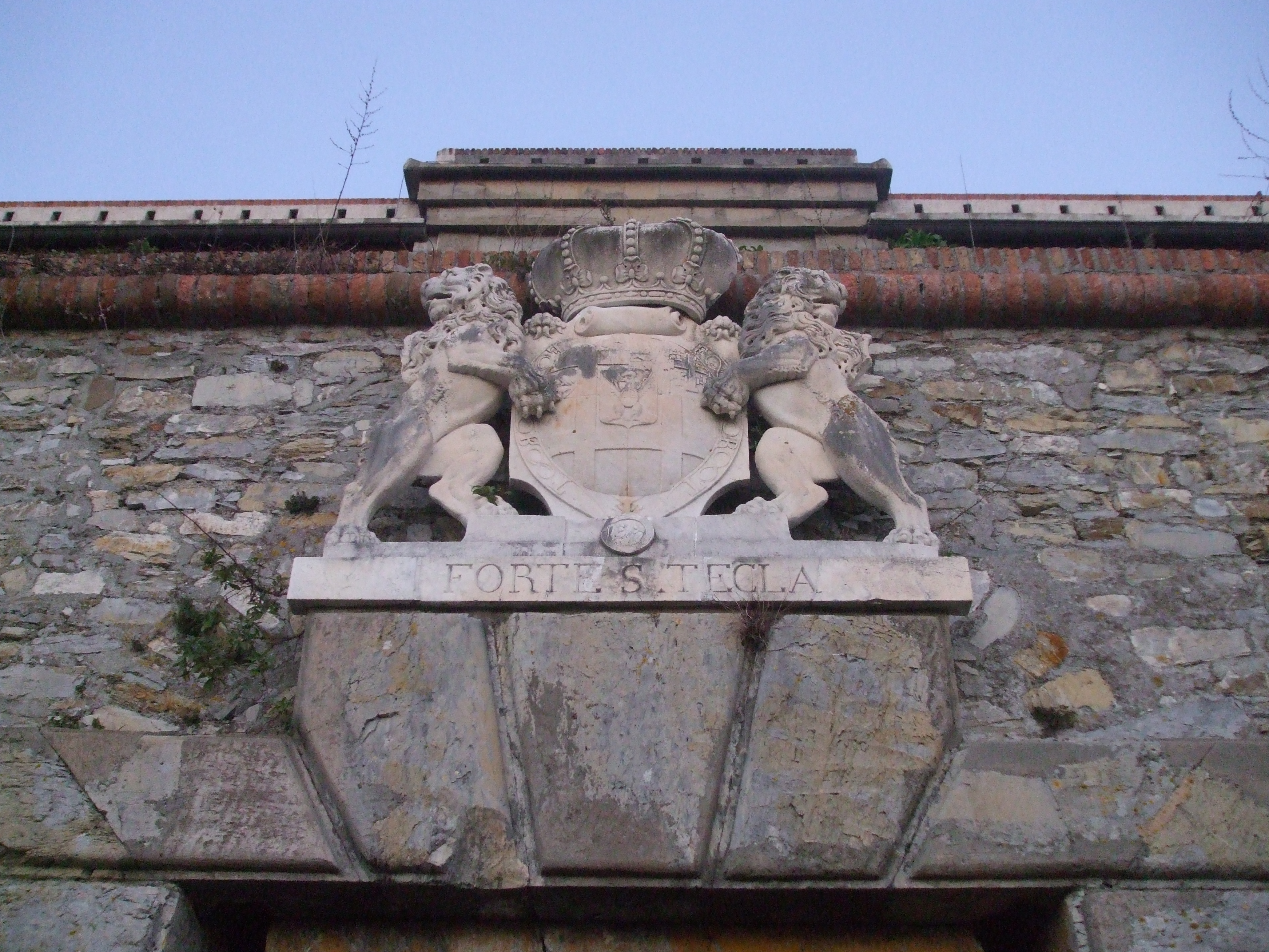 Foto della targa d'ingresso al Forte Santa Tecla, Camaldoli - Genova